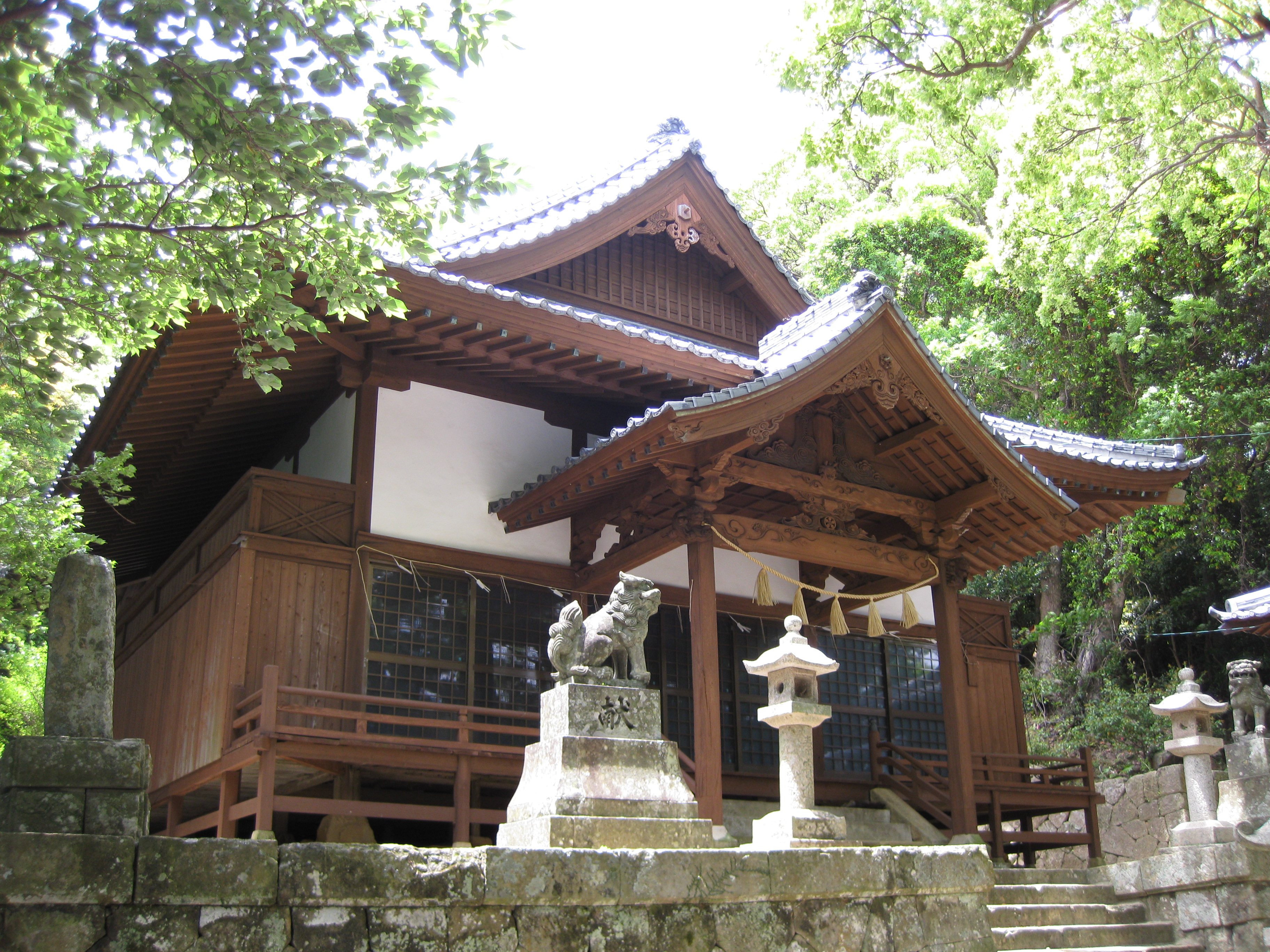 新上五島町浜ノ浦郷 天満神社